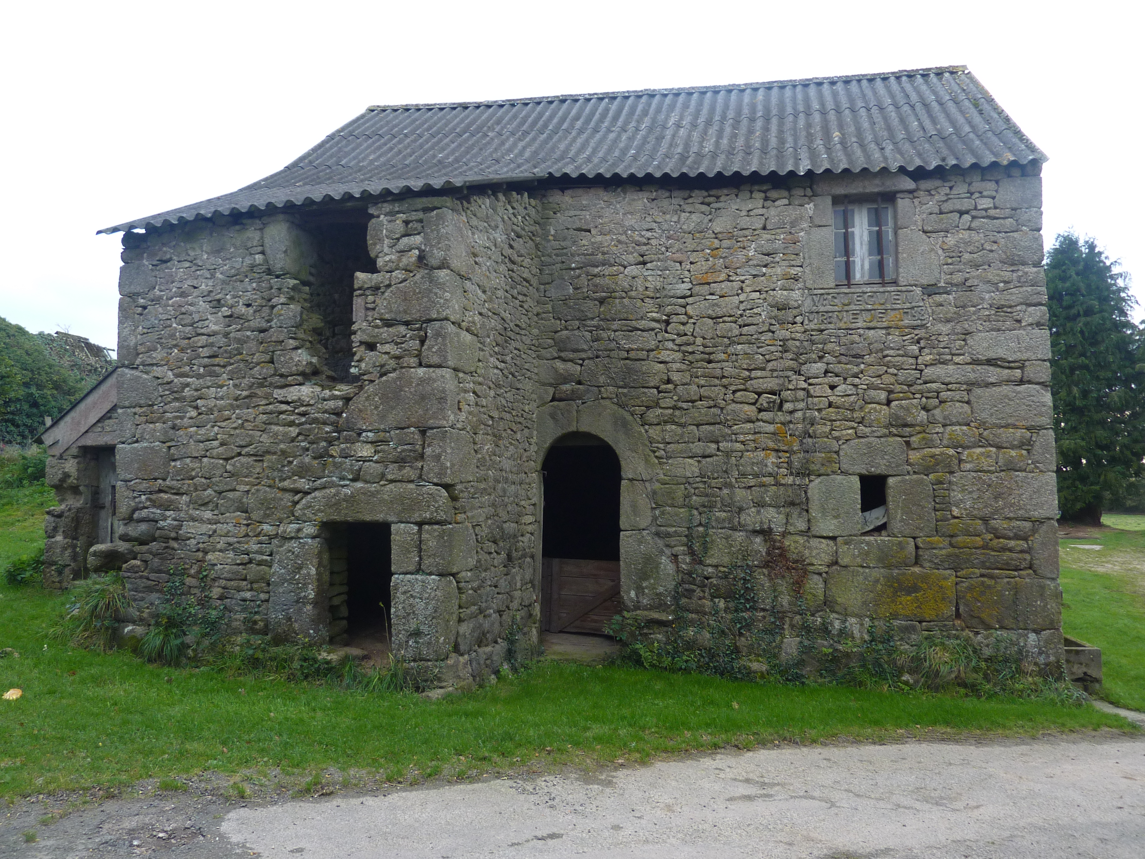 Plounéour-Ménez : ferme à Kergavan, construite par un couple de juloded (riches marchands de toiles), Yves Guéguen et Marie Mével, peu après leur mariage en 1736